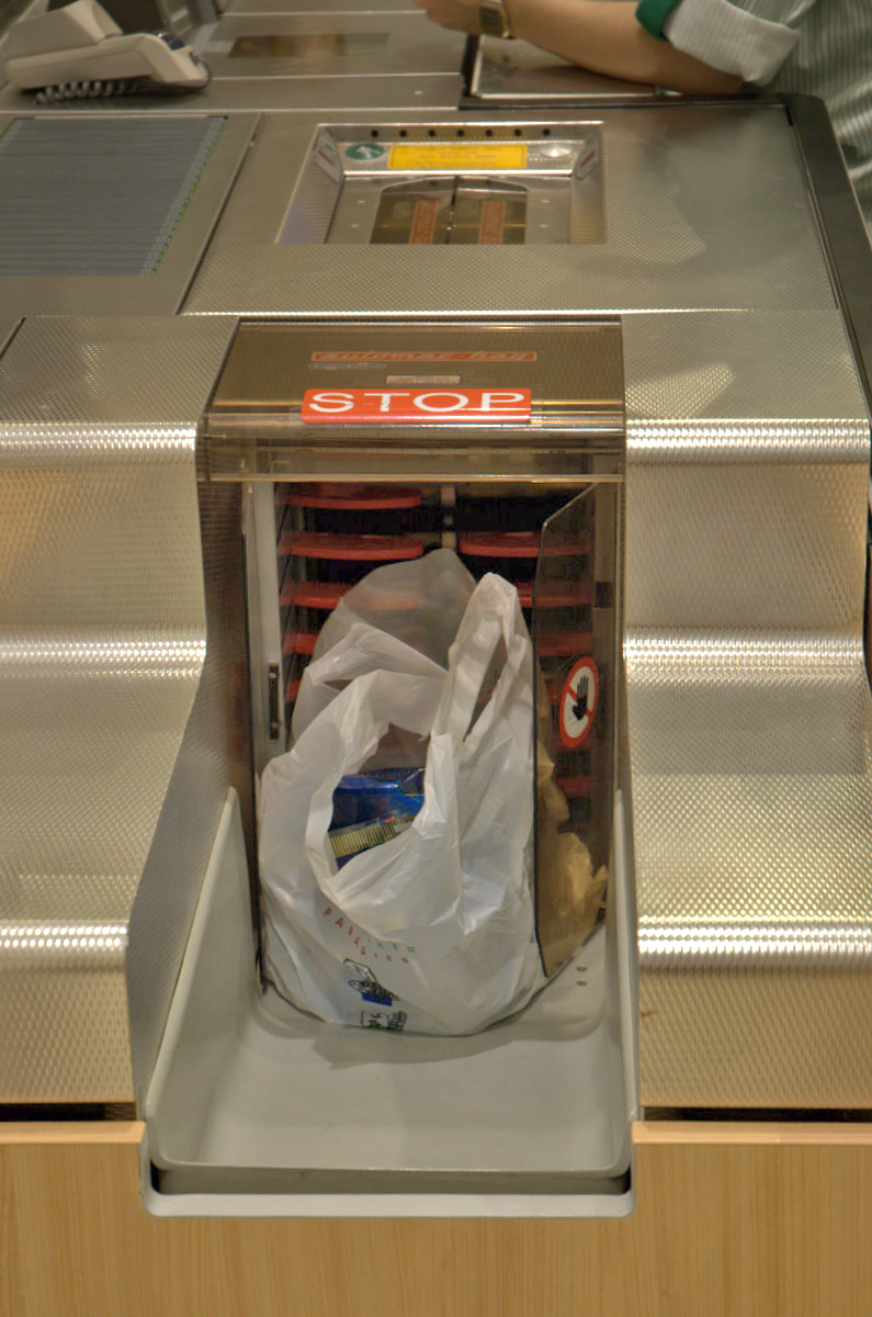 Maschine zum Eintüten der Ware an einer Kasse